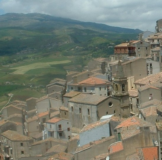 Gangi (PA), La parte bassa del paese con al centro la chiesa del SS. Salvatore